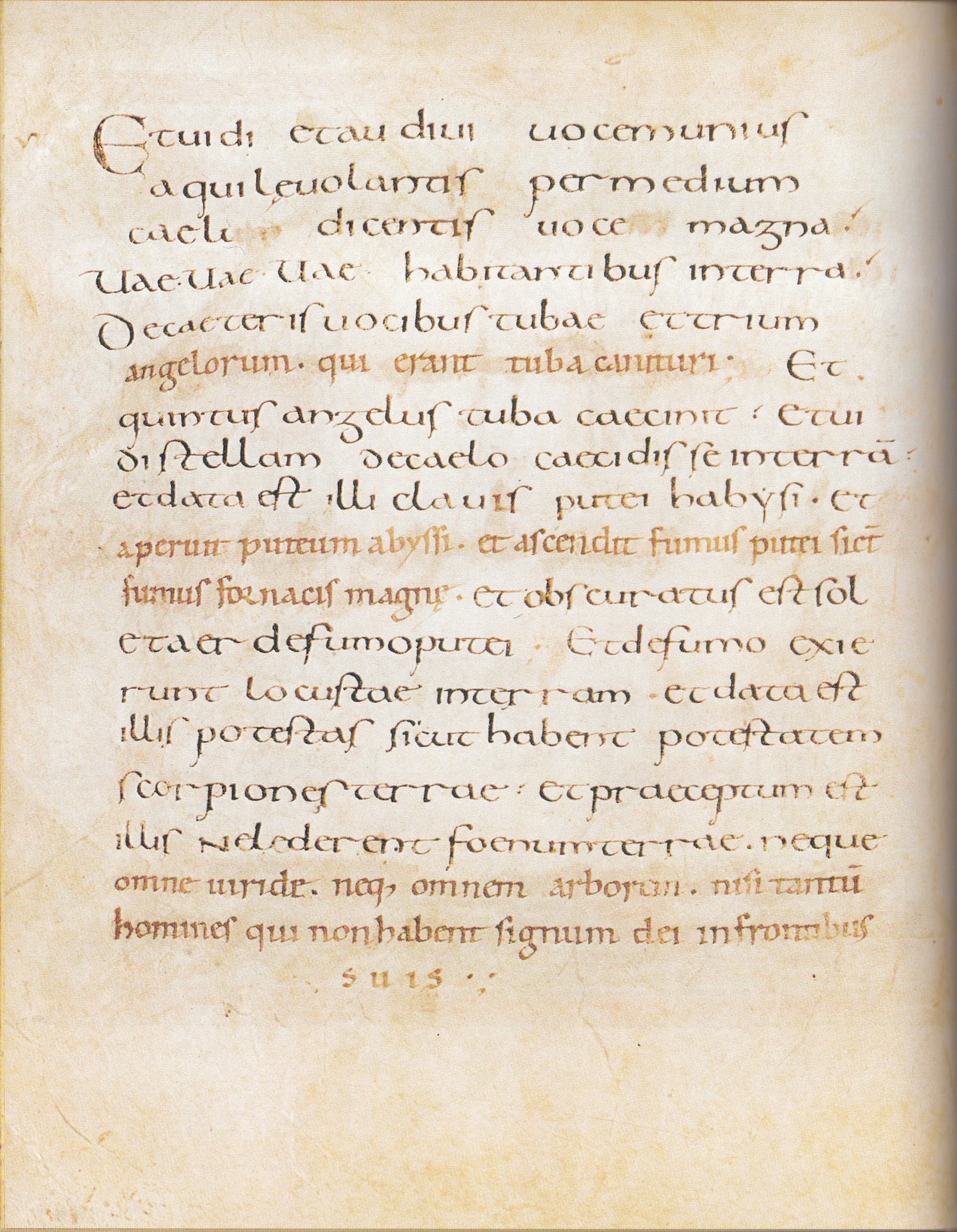 Textseite der Trierer Apokalypse: Offenbarung 8:13 bis 9:4